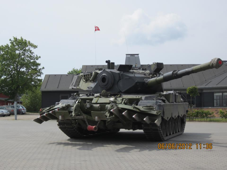 Leopard 1 A5 DK-1 med RAMTA mine plow